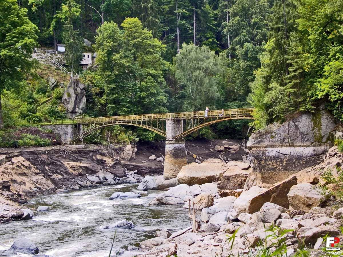 Niezwykły raczej widok. Woda w jeziorze Modrym została spuszczona bo prowadzono prace remontowe przy zaporze i stąd widać jak wysoka jest kładka prowadząca na drugi brzeg.